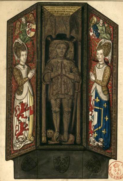 images collectées pour Gaignières se trouvant à la BNF numérisés par Gallica.